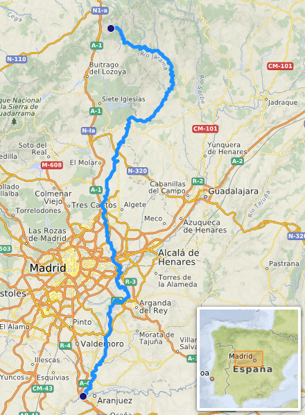 carte réalisée sur umap.openstreetmap This map may be incomplete, and may contain errors. Don't rely solely on it for navigation.